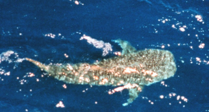 Walvishaai - - PD